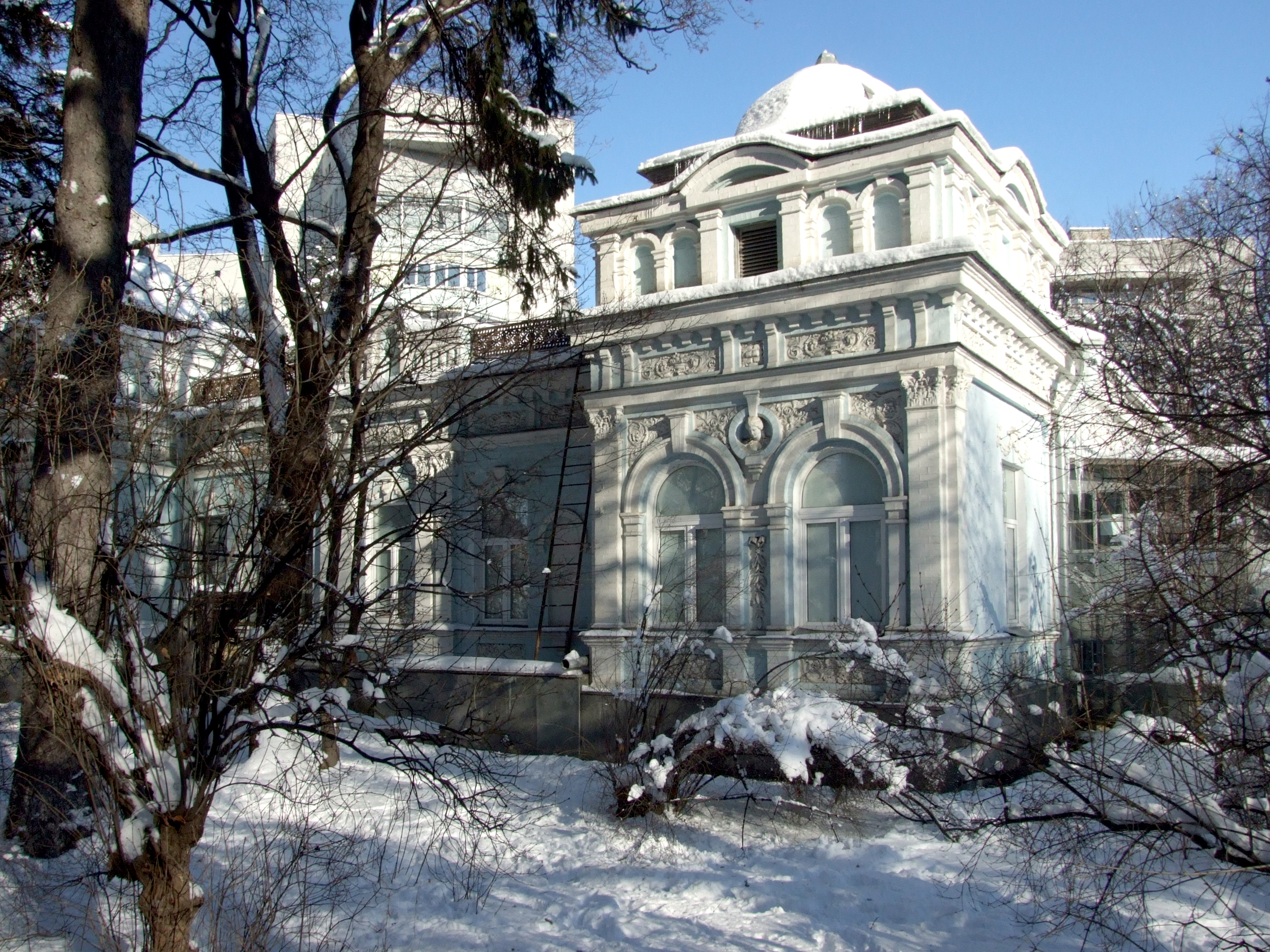 Особняк О.Д. Більського, арх. М. Казанський, 1893 р. (лівий будинок)